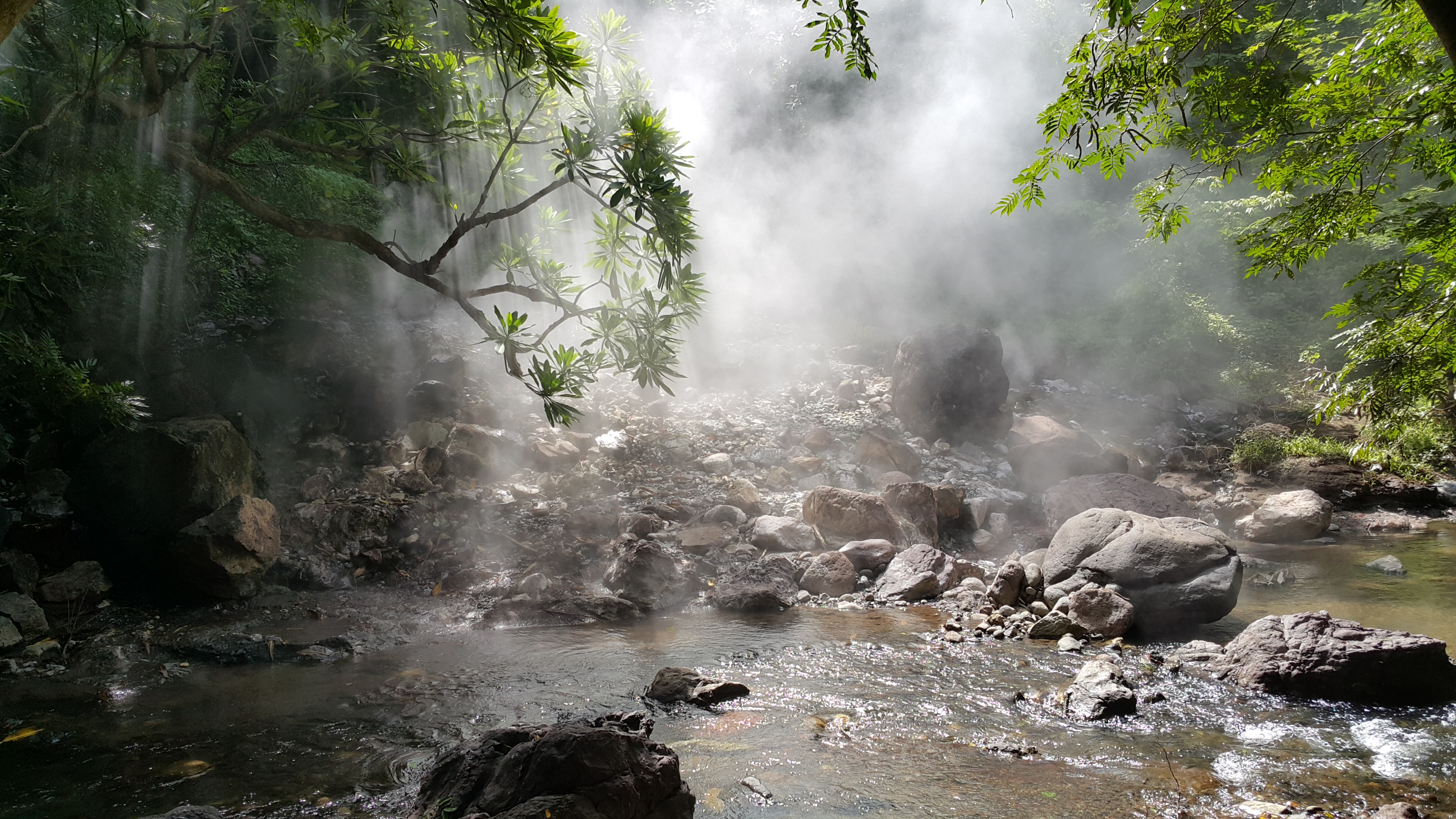 Aguas Termales, Magdalena Intibucá, Honduras.